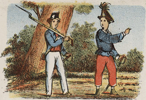 Soldaatje spelen. Kom aan, op schouder het geweer! Houd hier de wacht; loopt heen en weer, En toon steeds dat gij dapper zijt En van den vijand 't land bevrijdt!